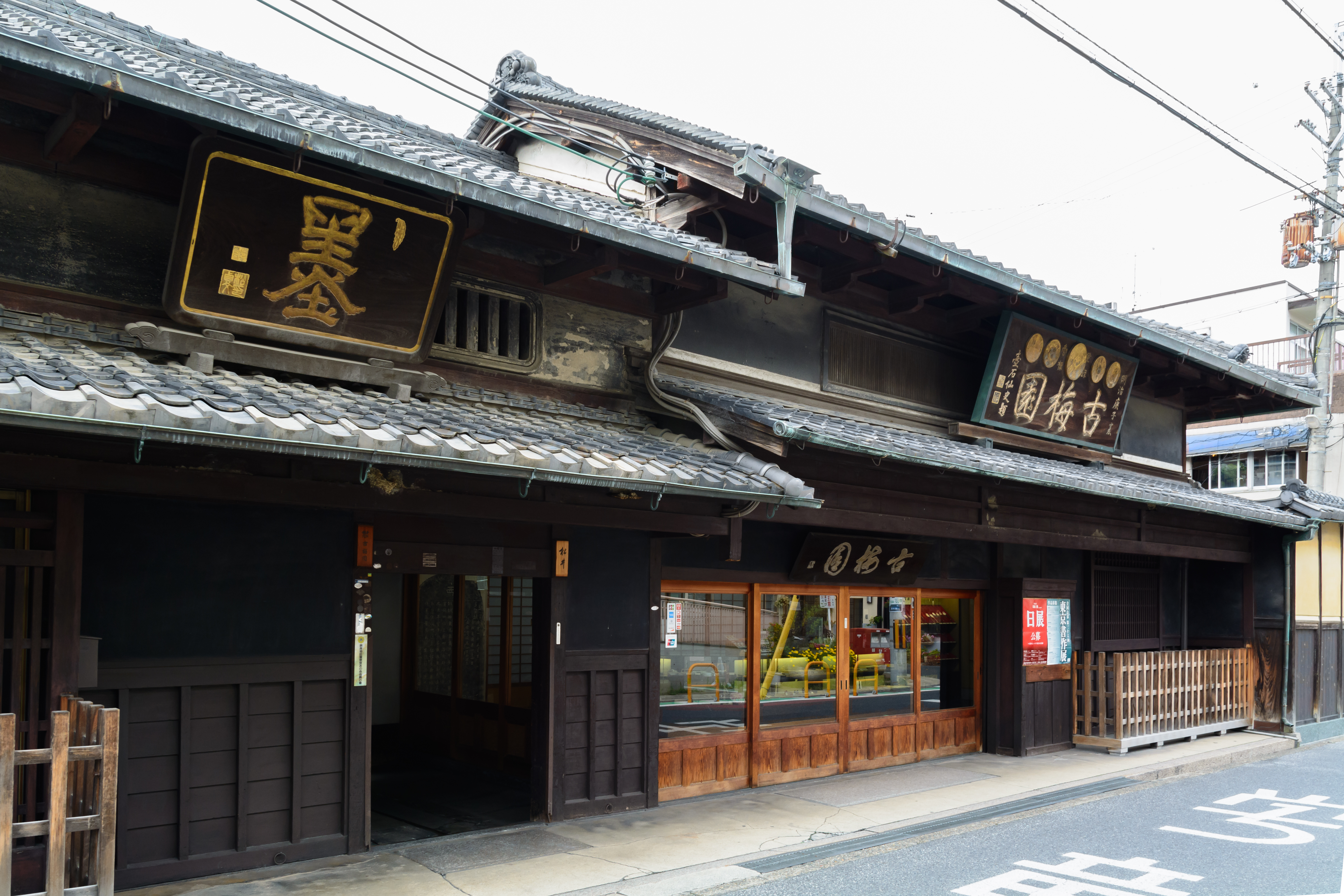 古梅園店舗（奈良市椿井町）。墨を扱う。登録有形文化財（建造物）1998年登録。